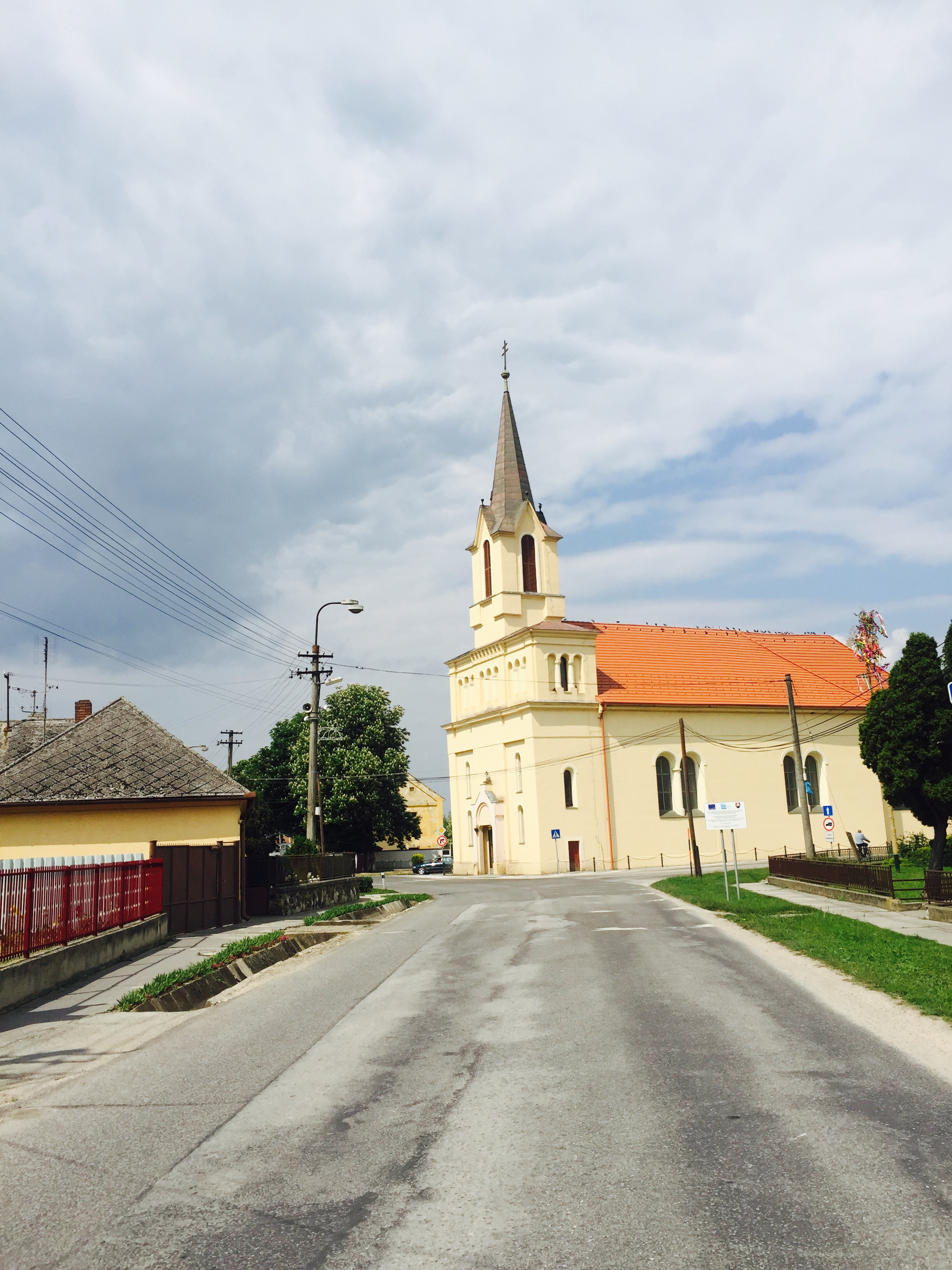 925 09 Košúty, Slovakia